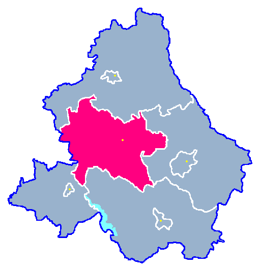 Locator maps for communes in województwo zachodniopomorskie : Radowo Małe gm.png (podział na gminy)